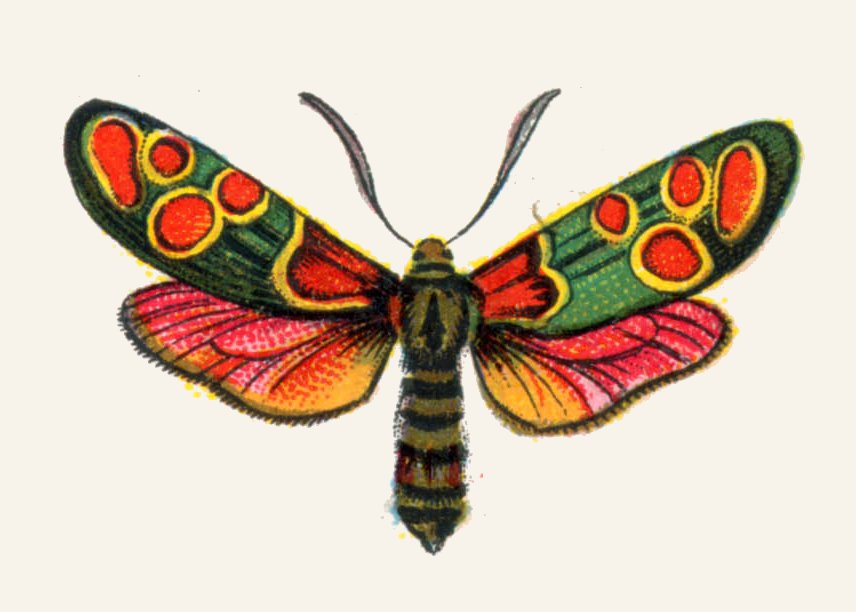 Zygaena carniolica